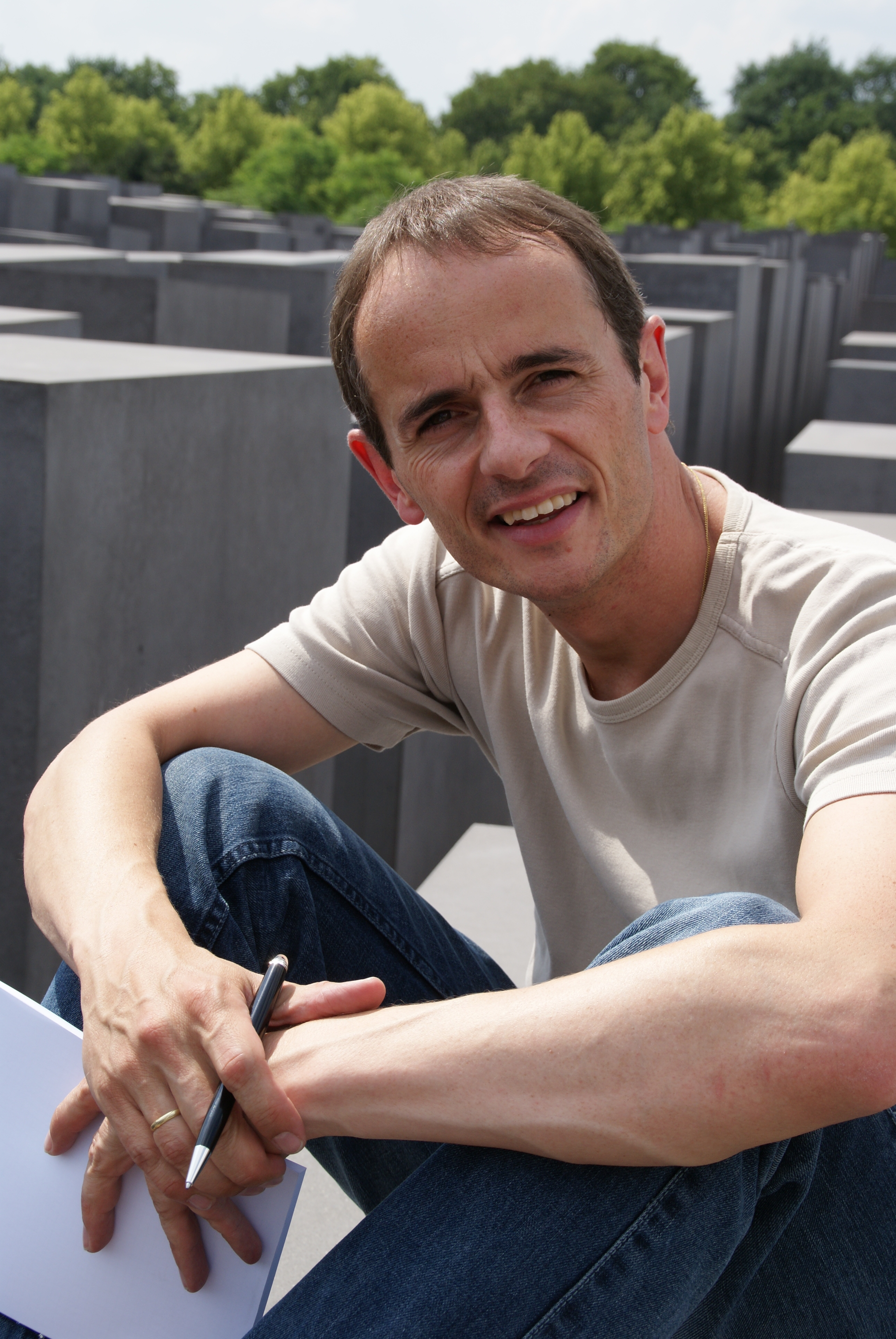 Kinder- und Jugendbuchautor Stefan Gemmel